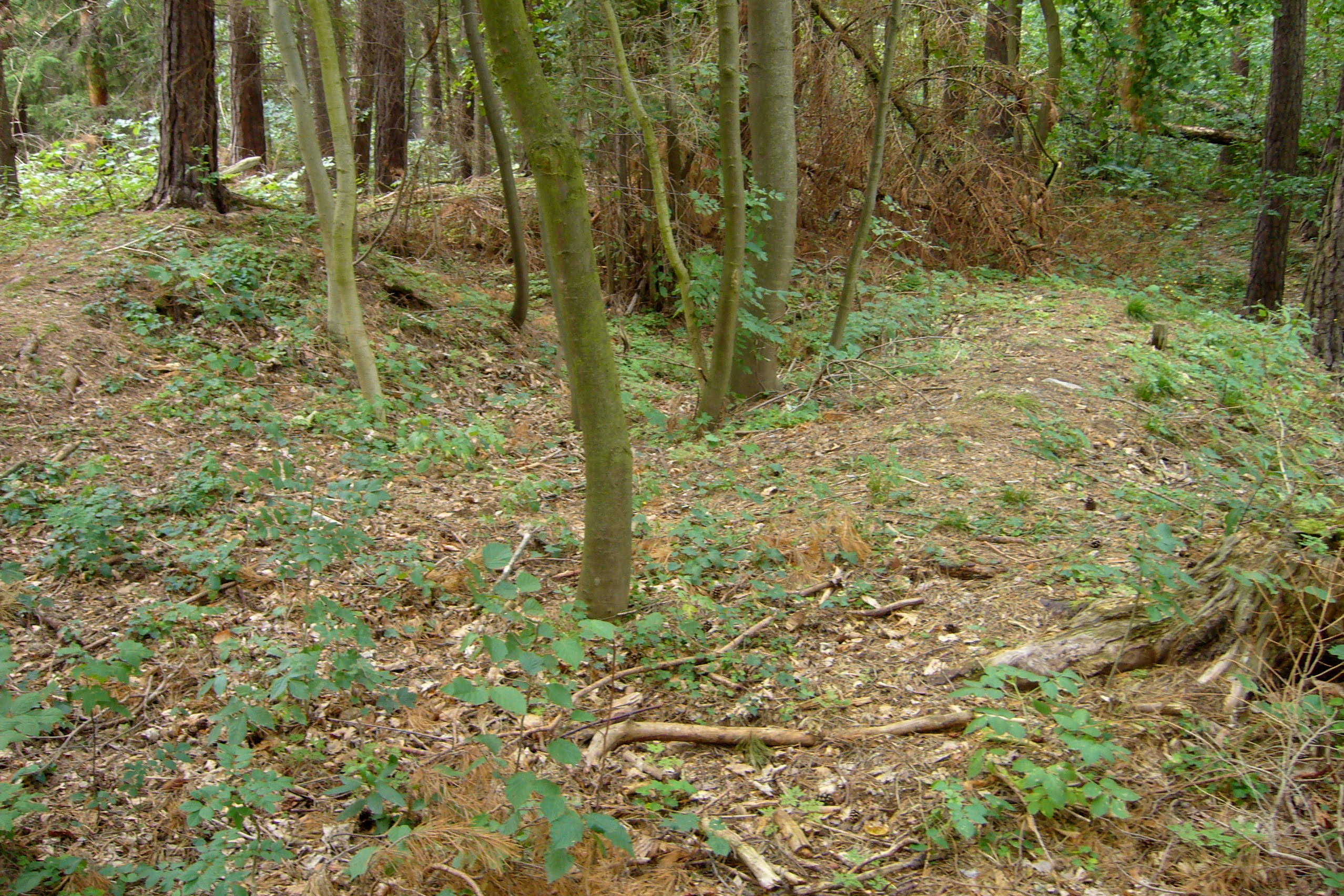 Prostor ve východní části hradního jádra, Ostrolovský Újezd.